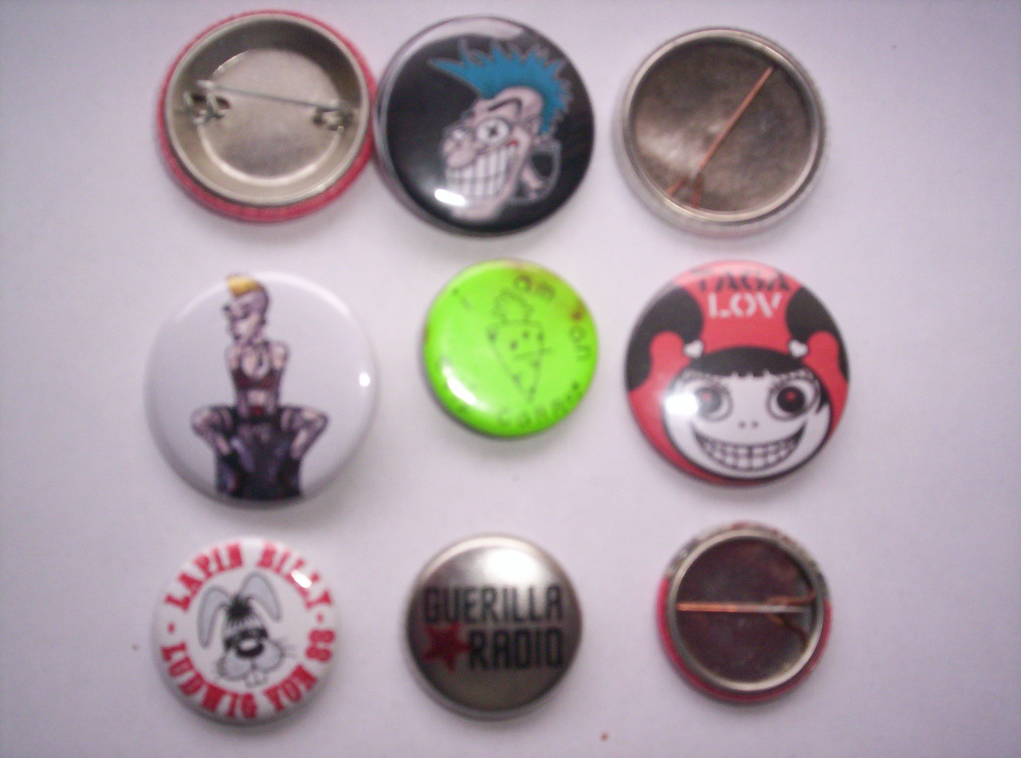 Pin buttons